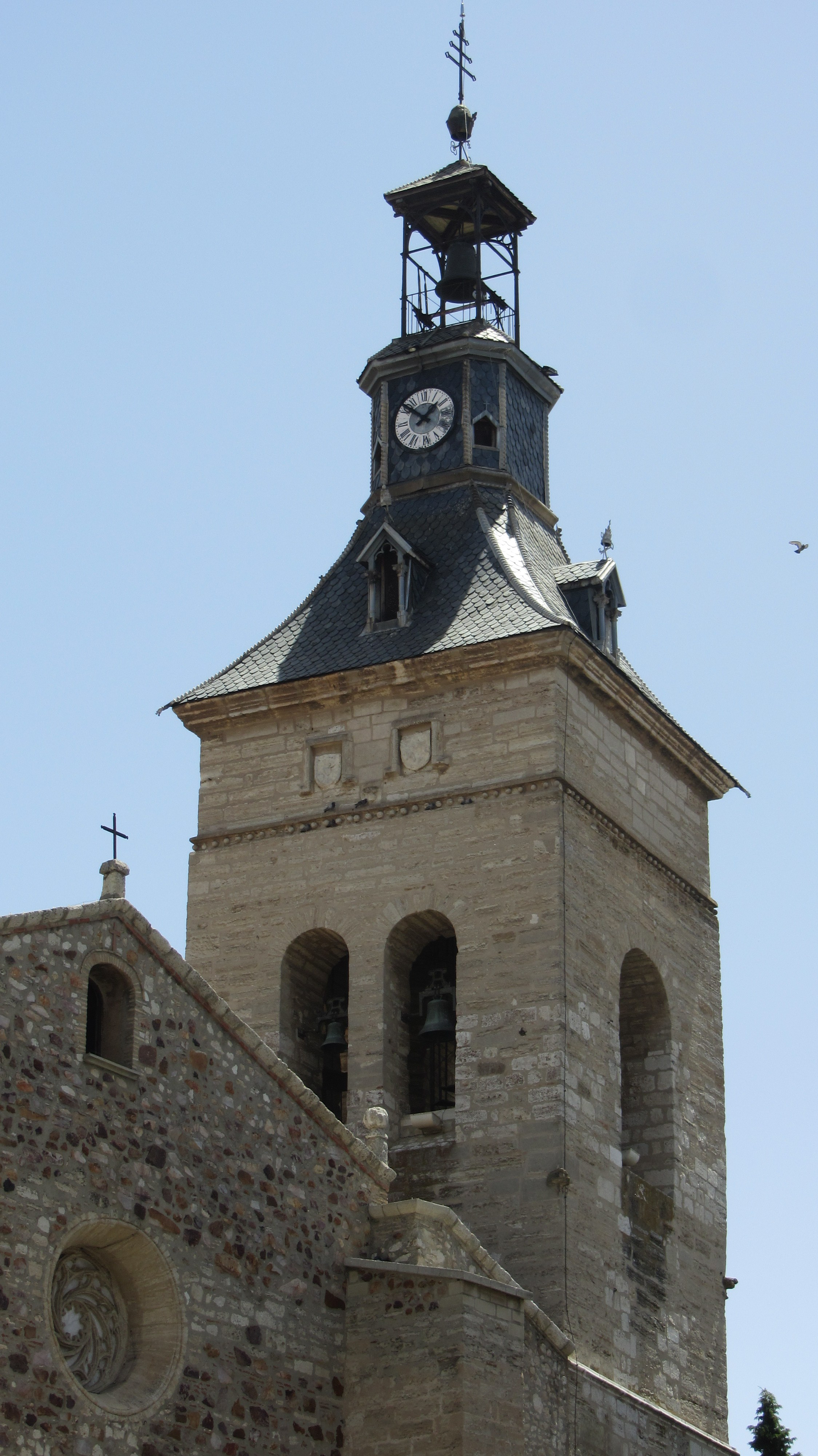 Torre de la Iglesia de San Pedro en Ciudad Real (España) de la segunda mitad del siglo XIV.